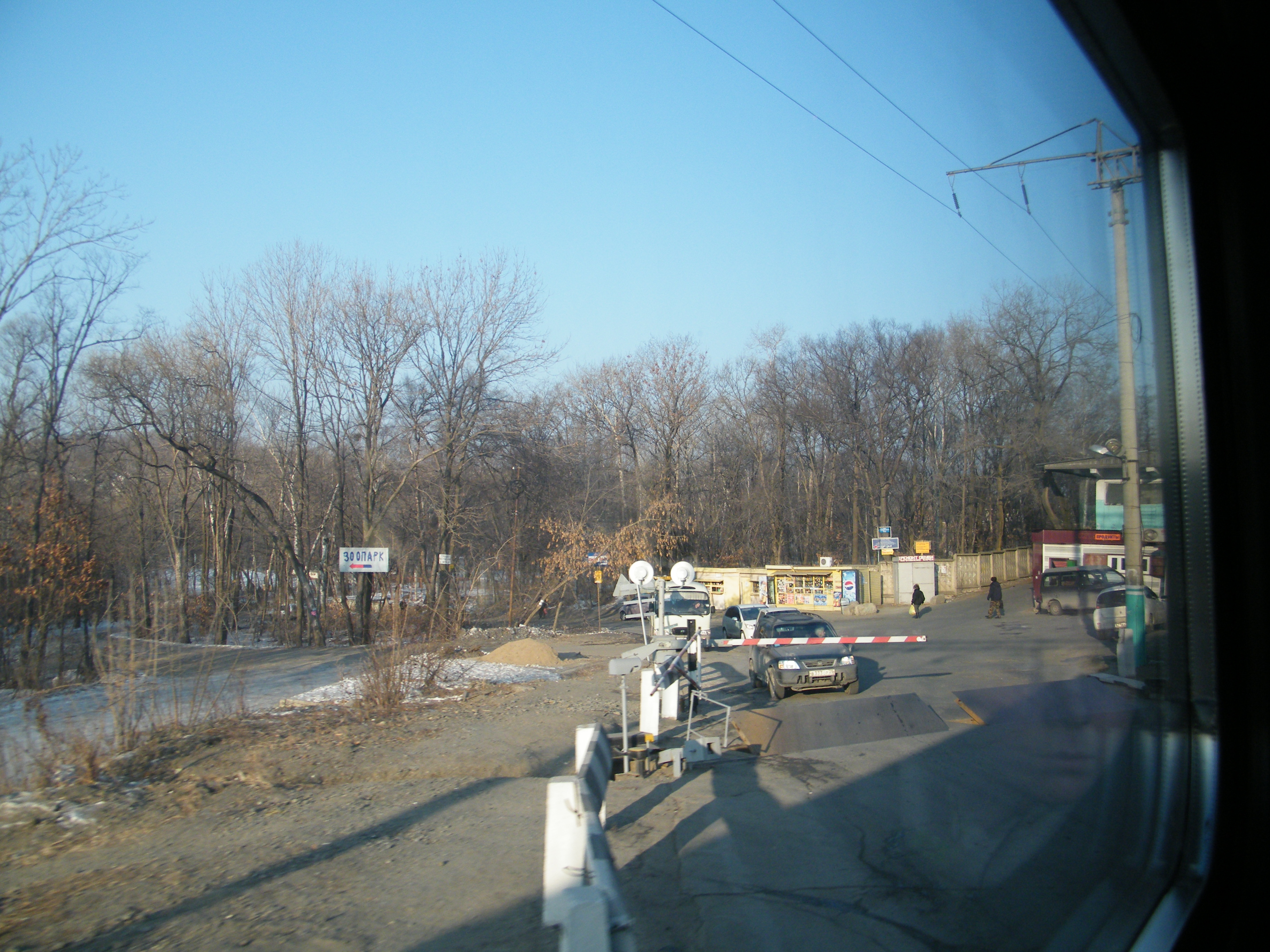 Платформа Садгород Владивосток